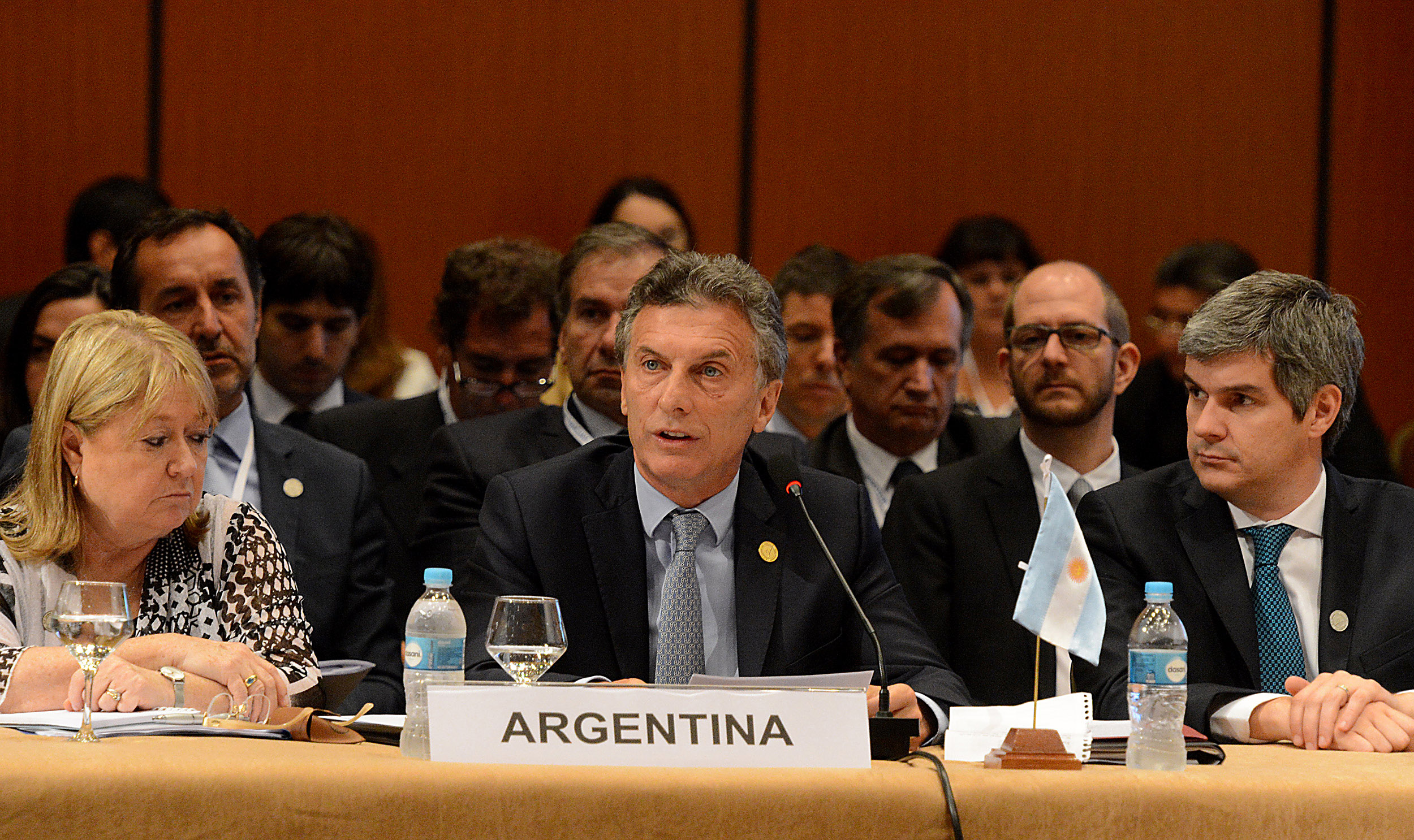 El Presidente expuso ante la 49° cumbre de jefes de Estado de los países miembros del Mercosur.